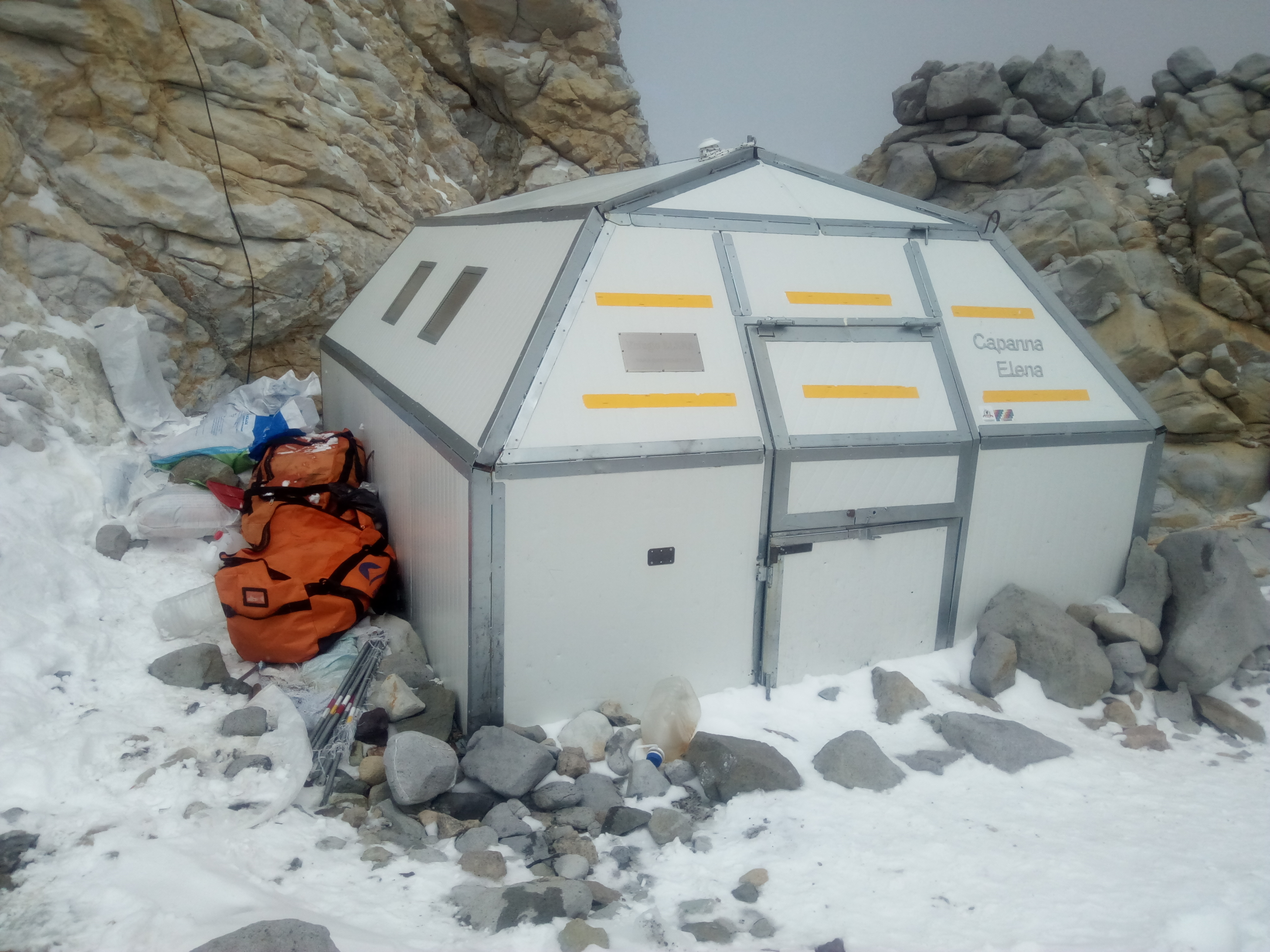 Refugio de emergencia Elena ubicado en Campo Cólera